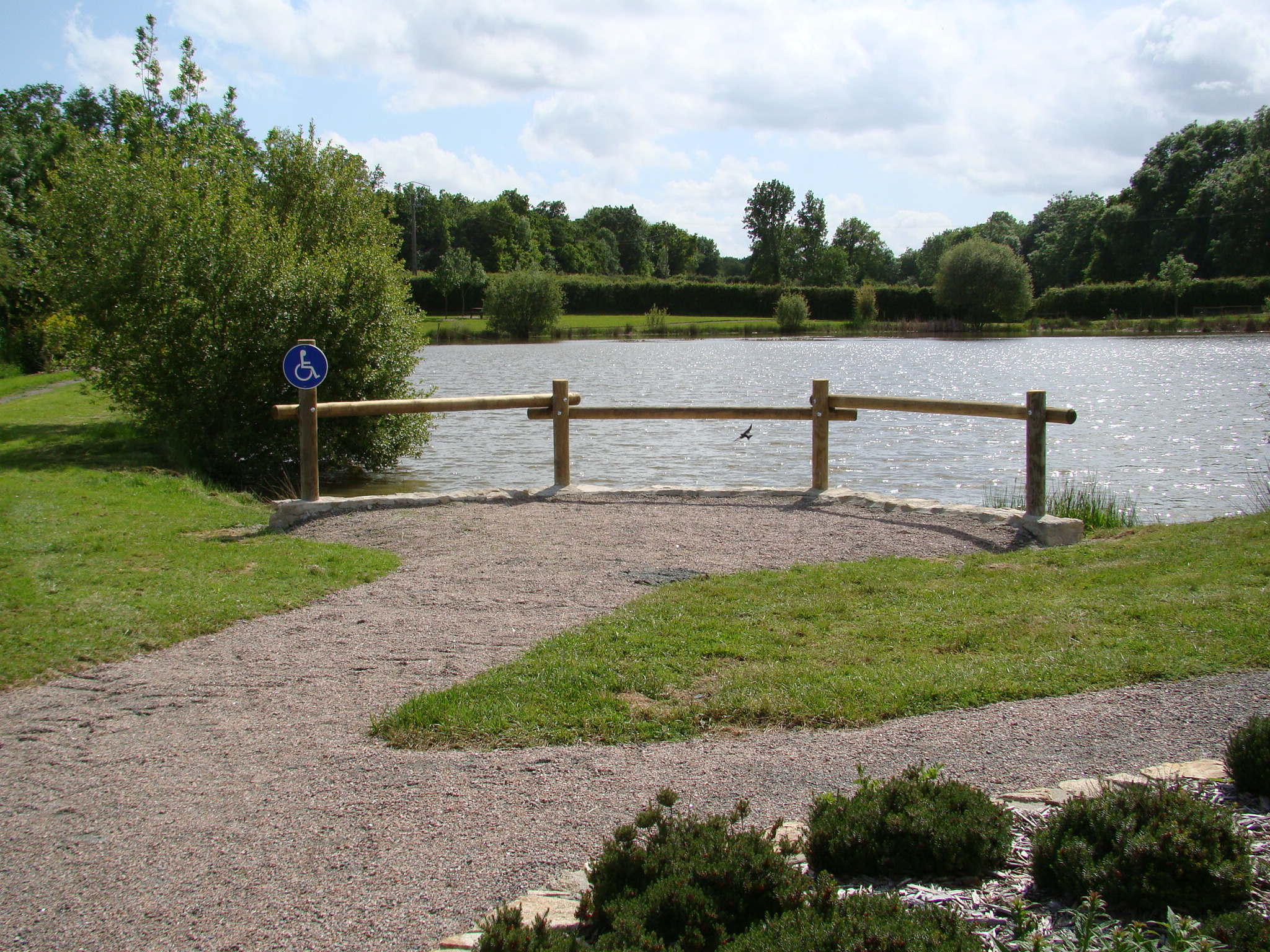 L'étang du Gardou à Noirterre (Deux-Sèvres - France)